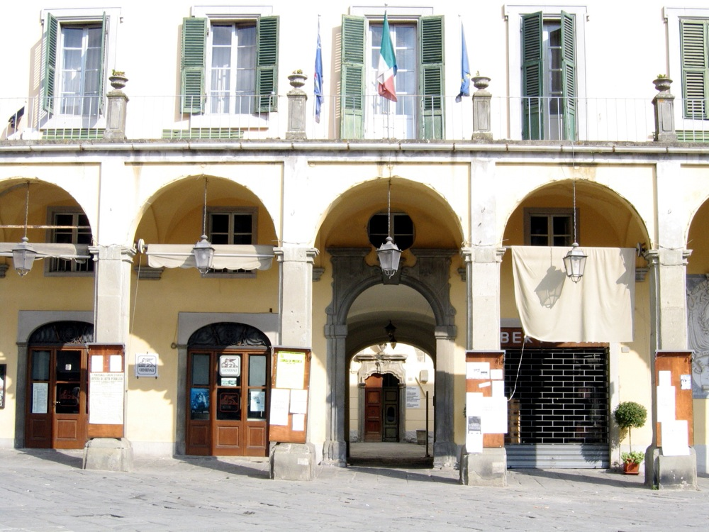 Pontremoli, Toscana, Italia